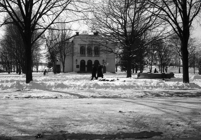 Nyköpings Teater.